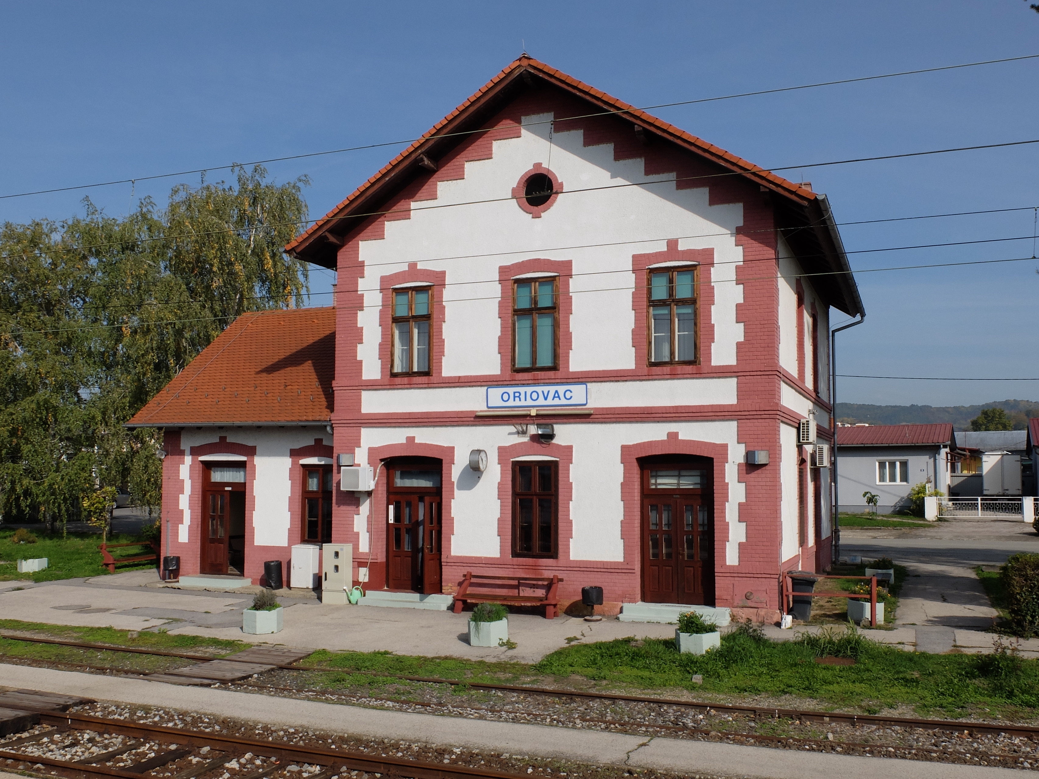 Bahnhof von Oriovac